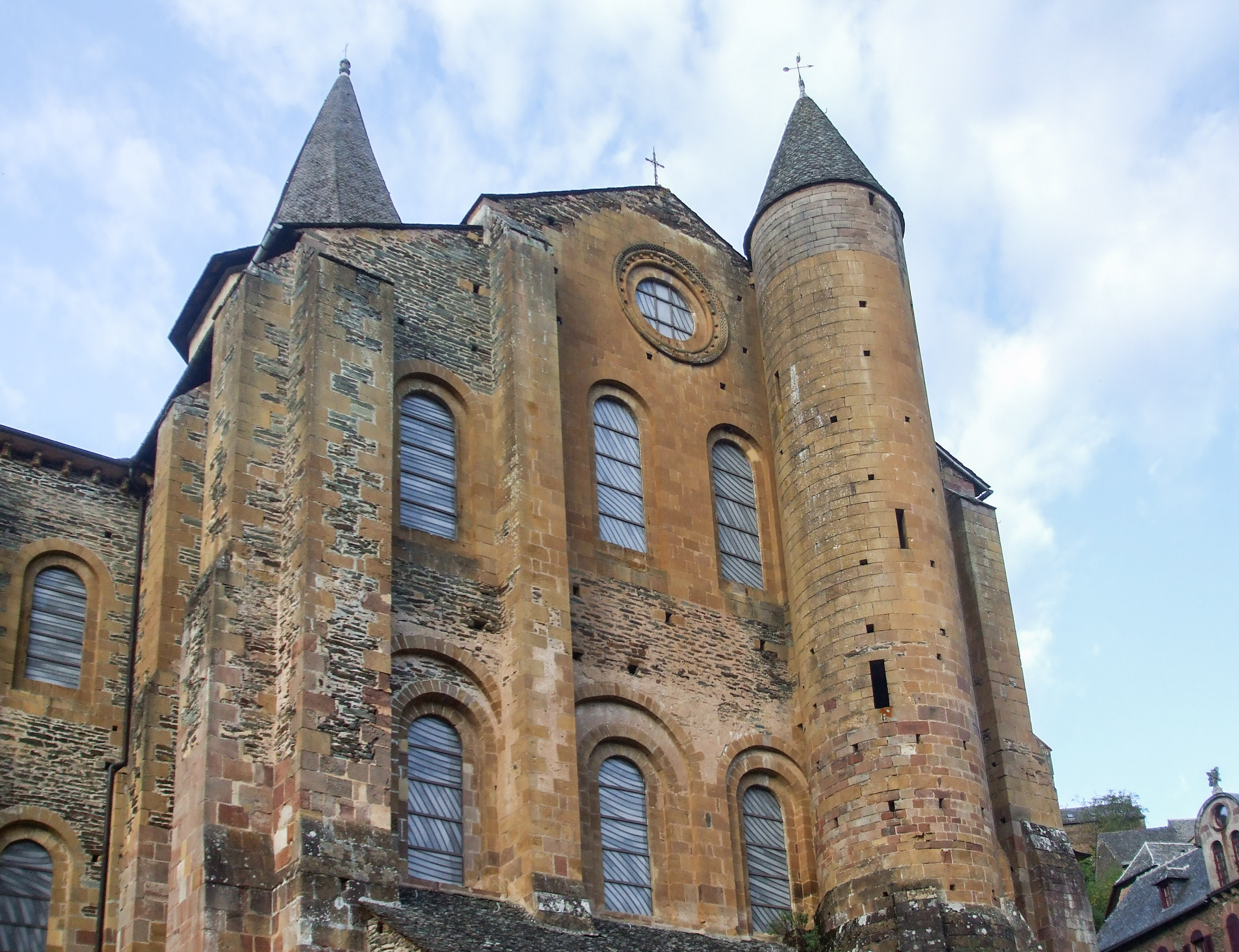 Conques (Aveyron, France), abbaye sainte Foy, étape sur le chemin de St Jacques de Compostelle.